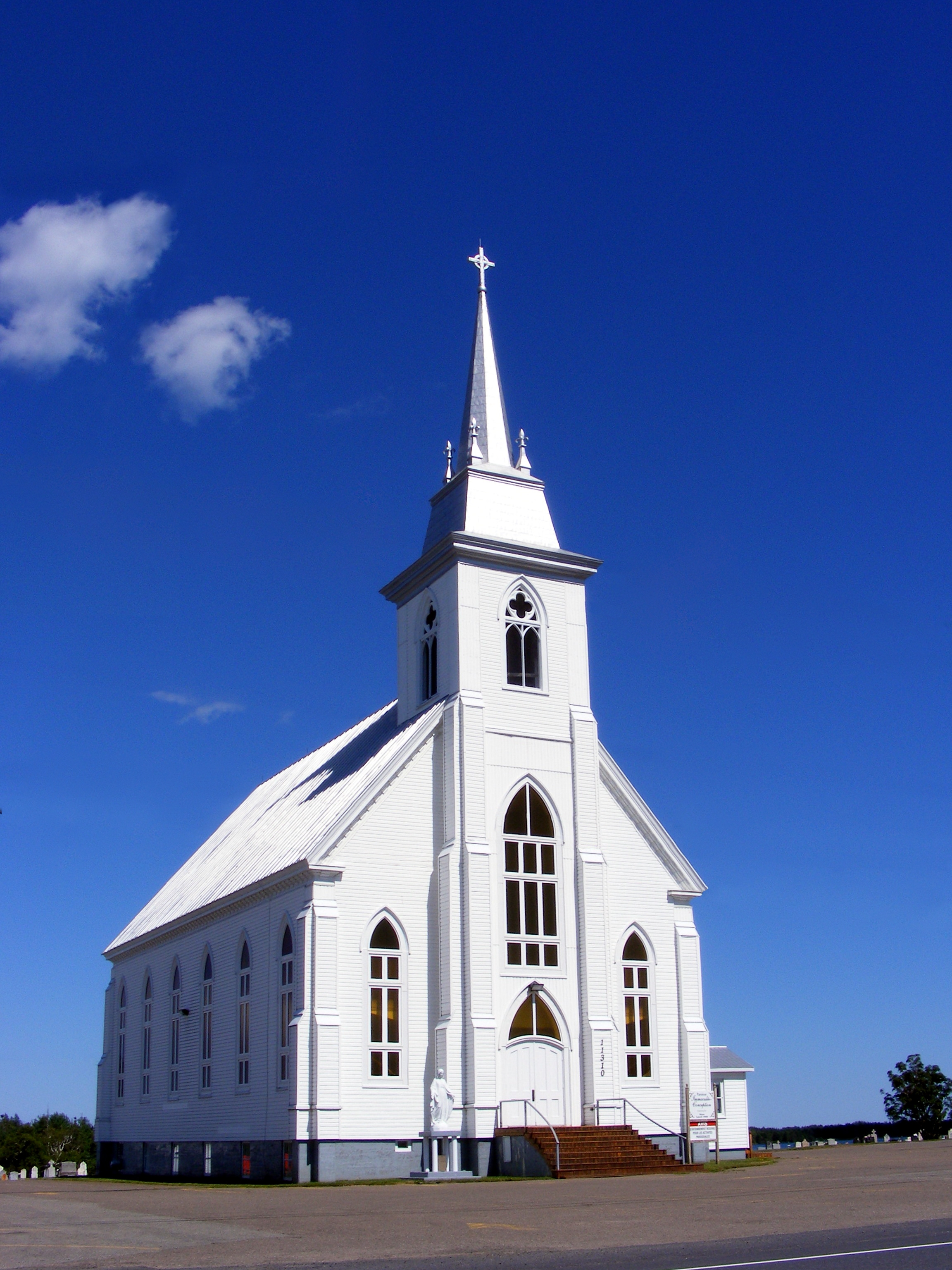 Église Immaculé Conception de Pokemouche